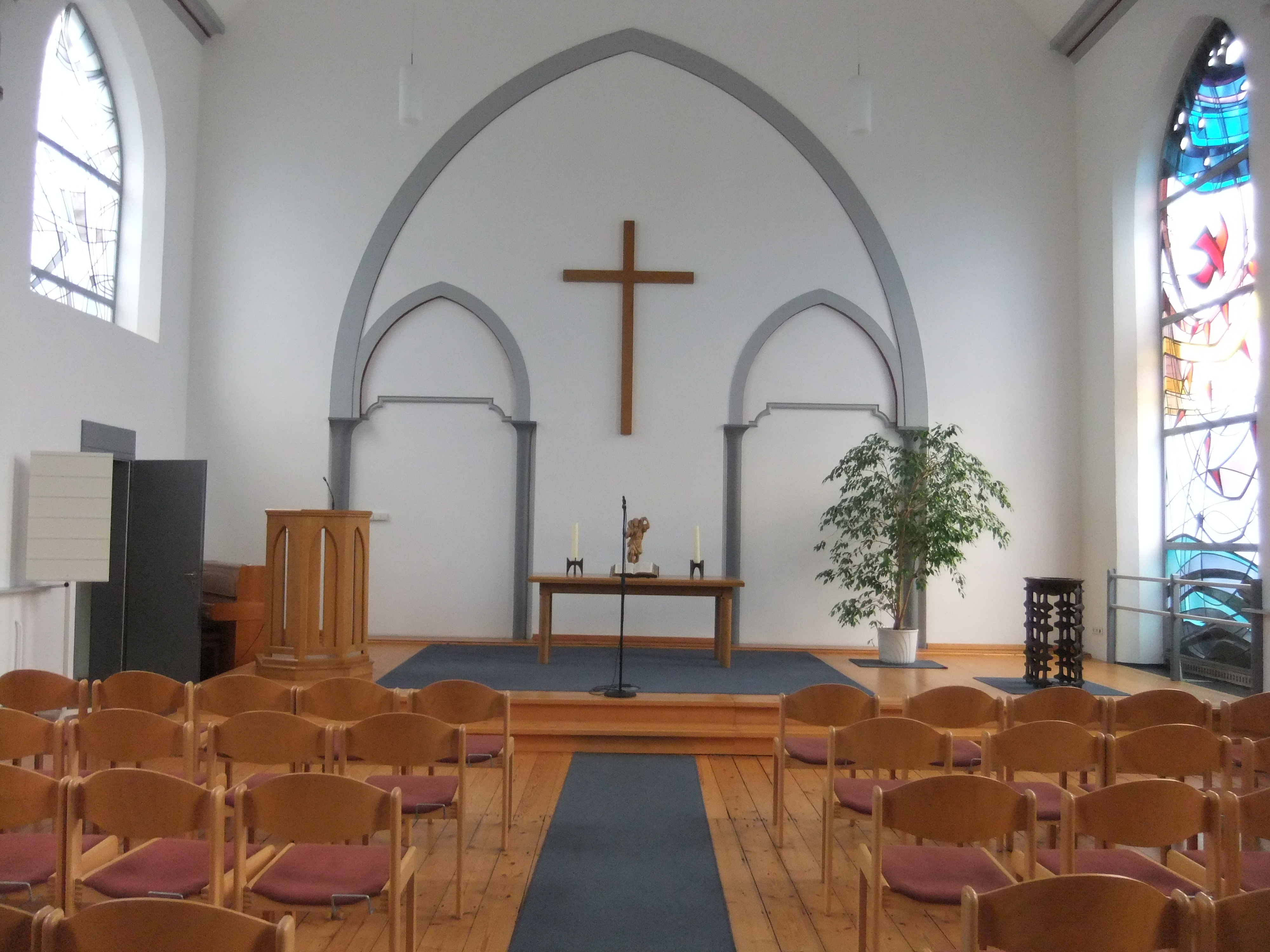 Ansichten der Evangelischen Kirche im Wuppertaler Ortsteil Laaken